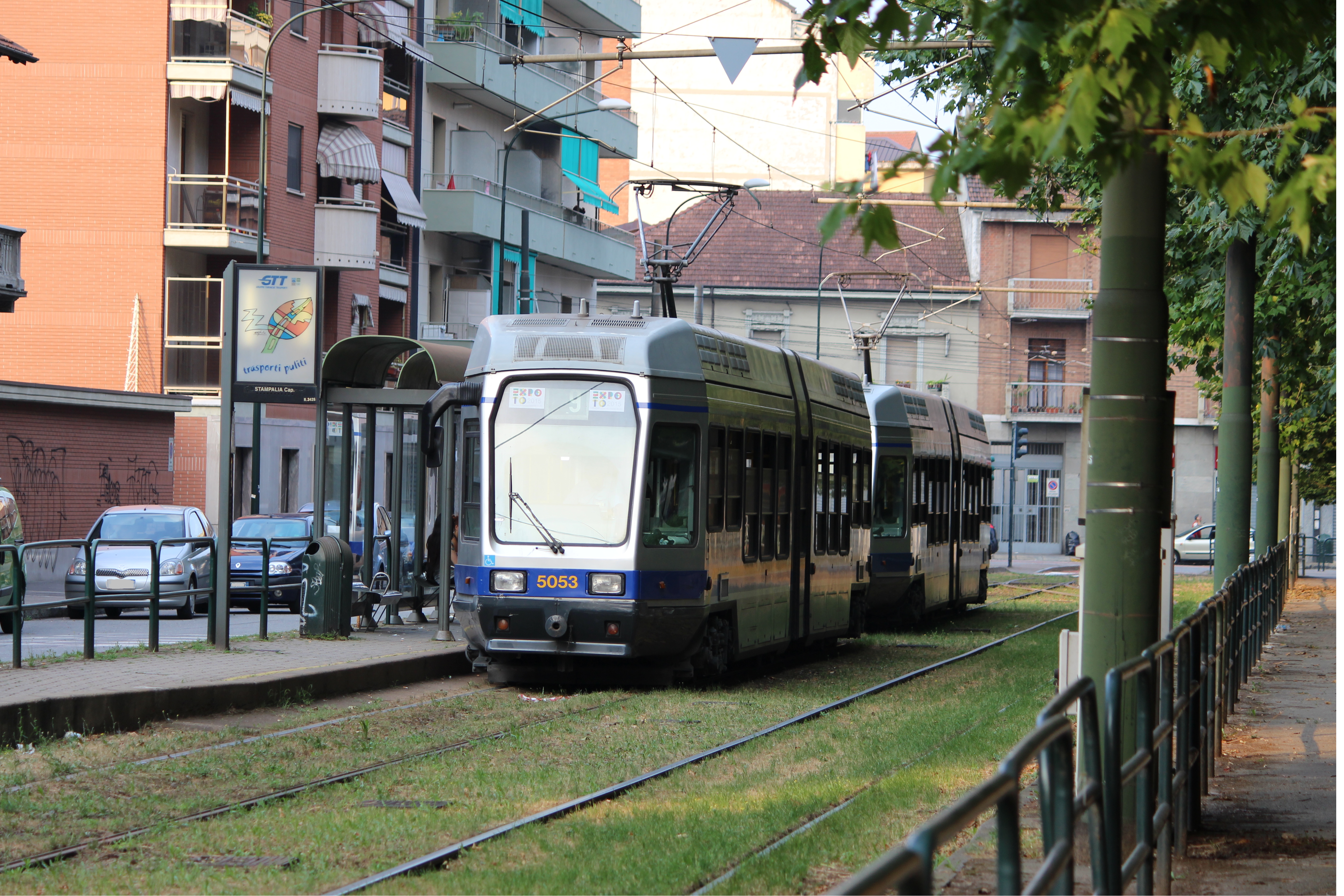 Due tram serie 5000 sul 9 in piazza Stampalia